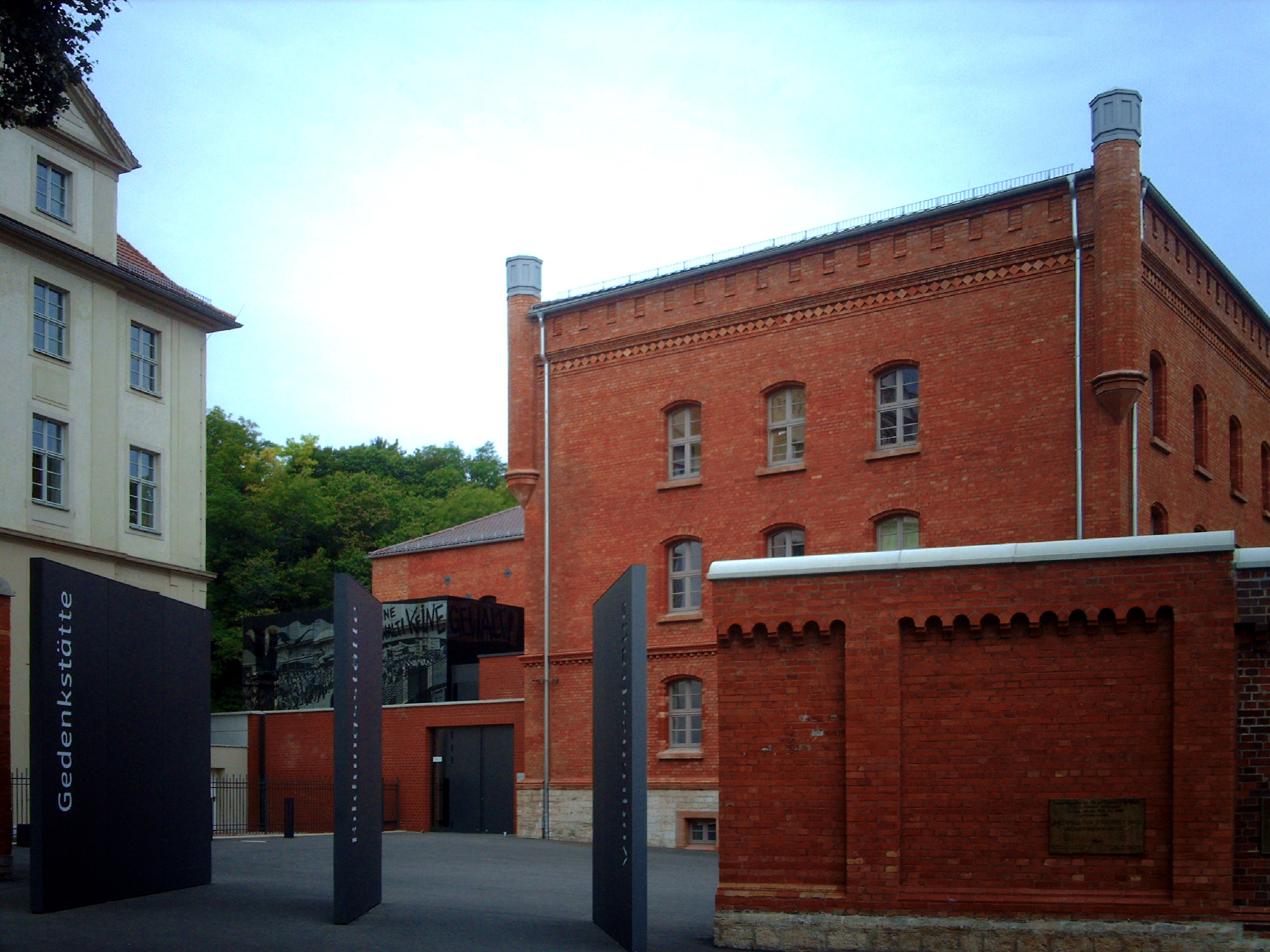 Gedenkstätte in der Andreasstraße, ehemals Gefängnis des Staatssicherheitsdienst (Erfurt)